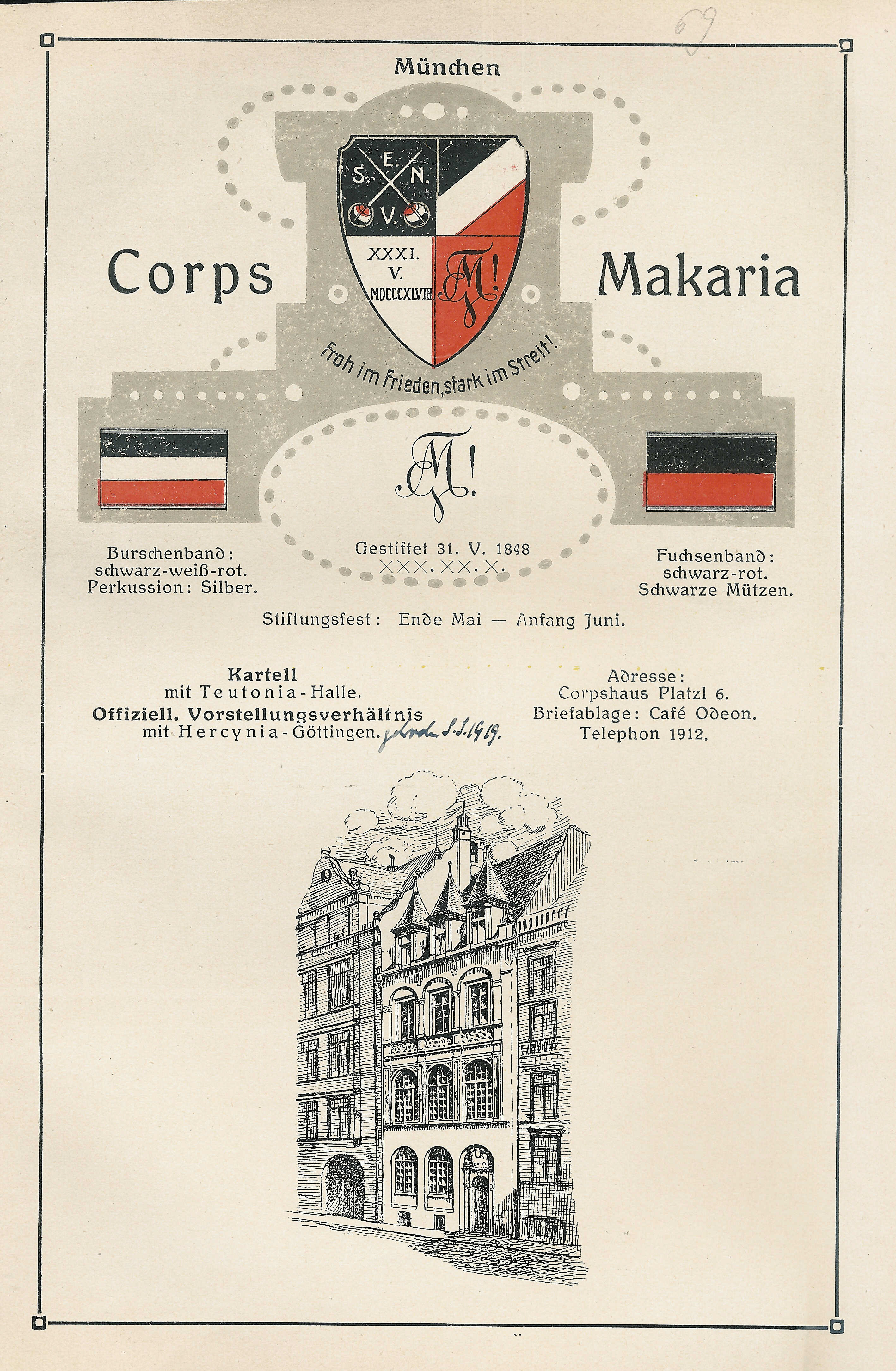 Couleur, Wappen, Zirkel und Corpshaus der Makaria München